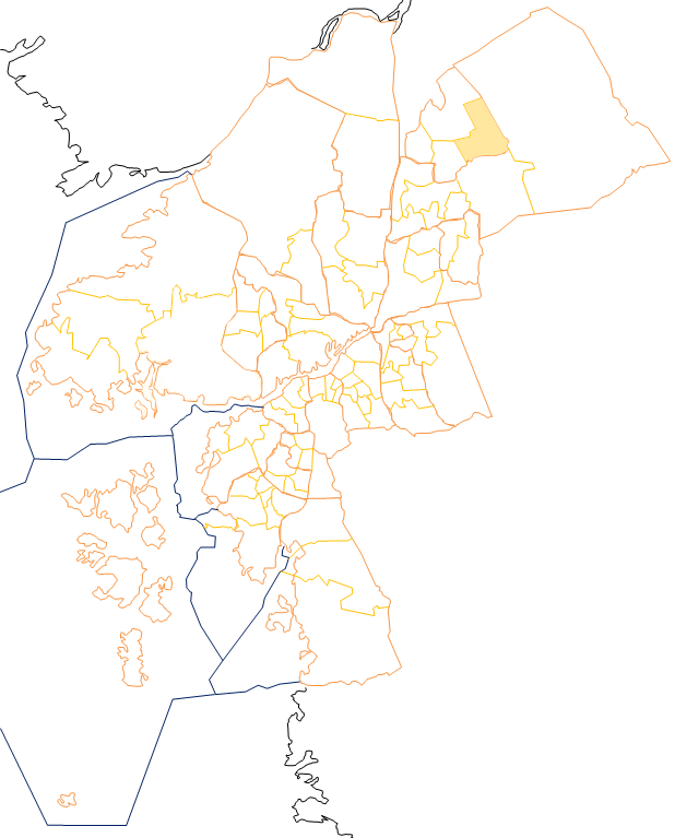 Karta som visar primärområdes belägenhet i Göteborg